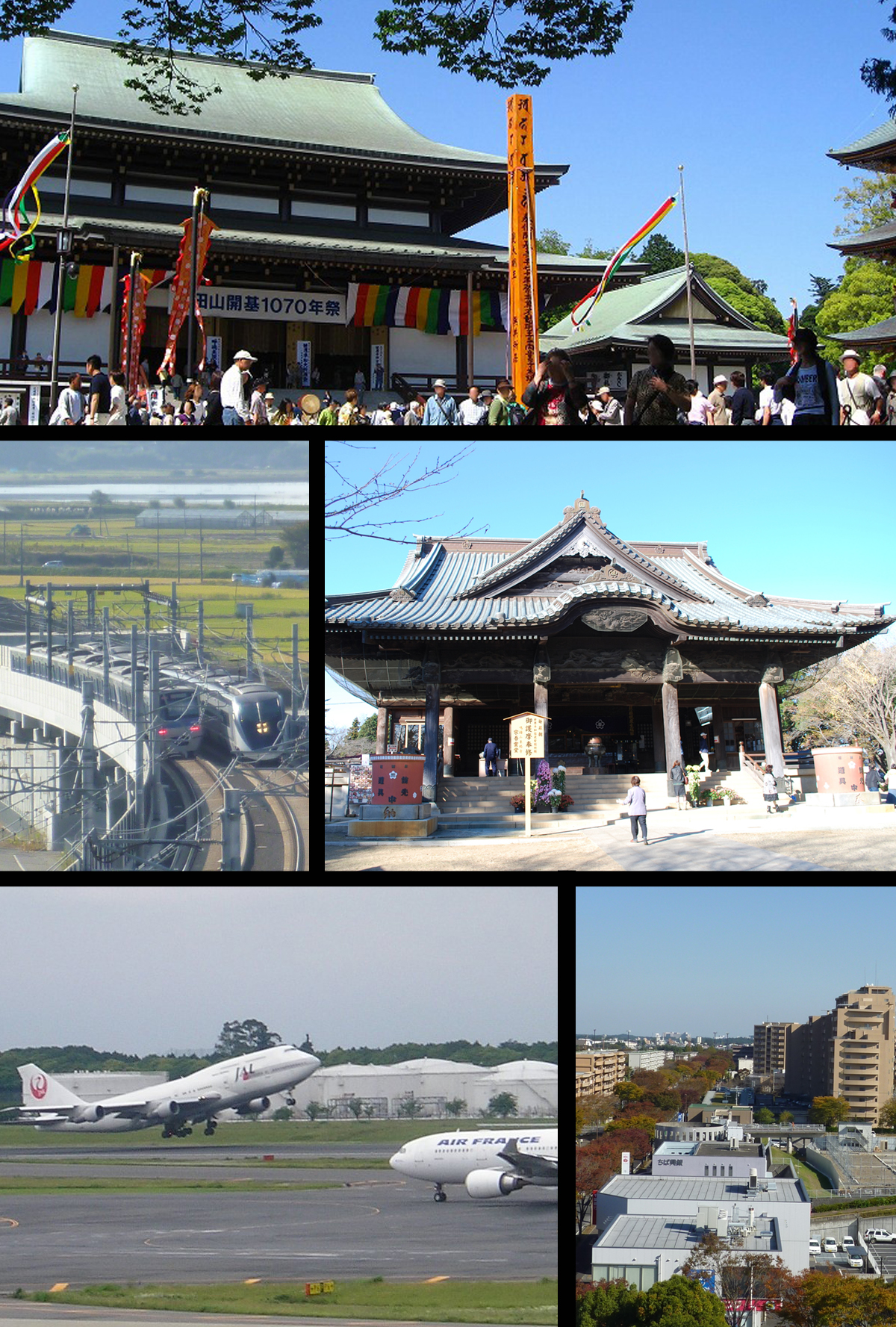 成田山新勝寺 成田スカイアクセス線と印旛沼 東勝寺（宗吾霊堂）大本堂 成田国際空港 成田ニュータウン